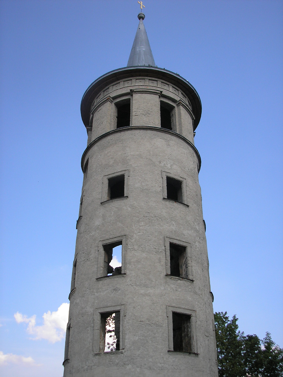 Ruine eines Turms des Schleizer Schlosses.